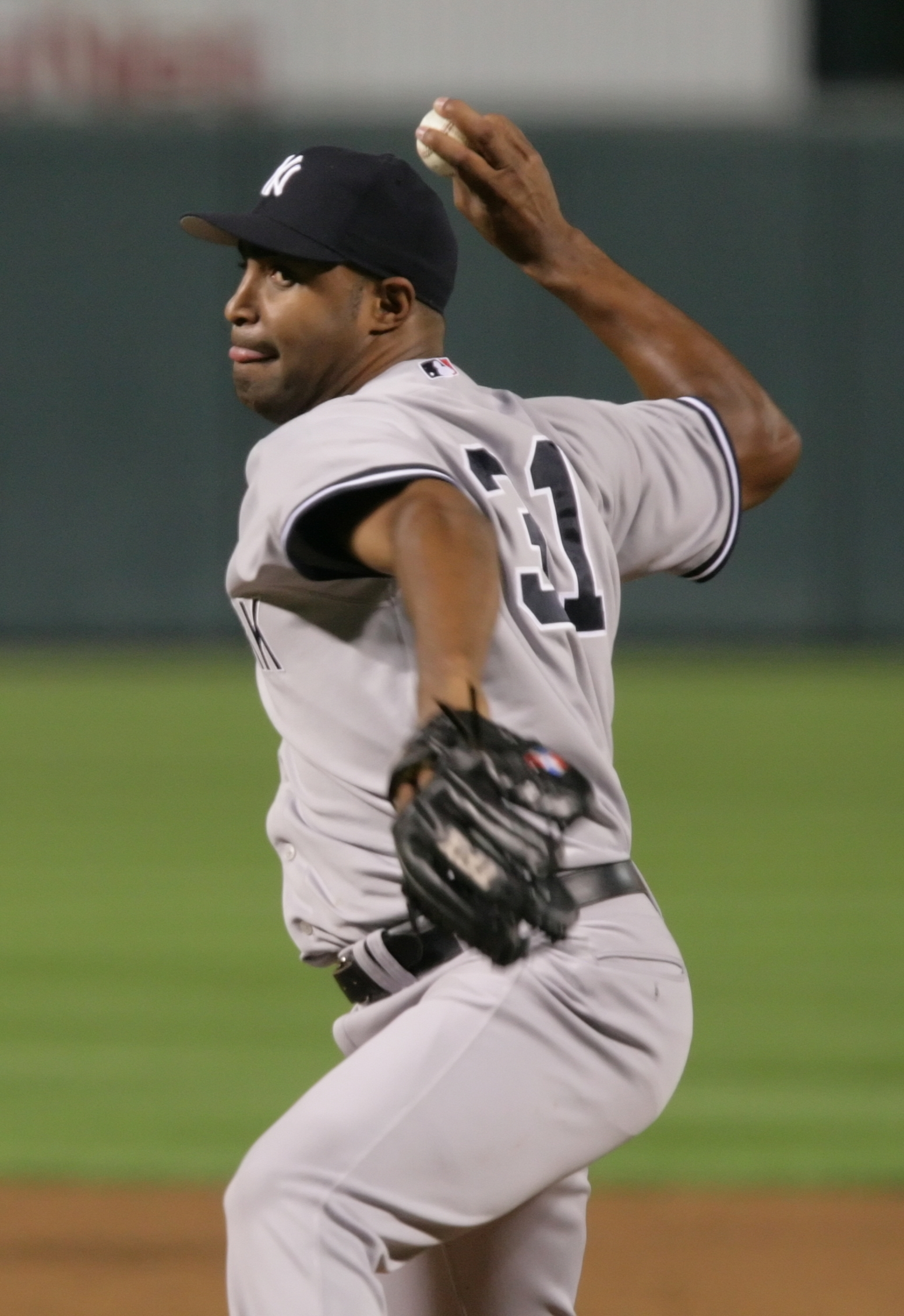 José Veras